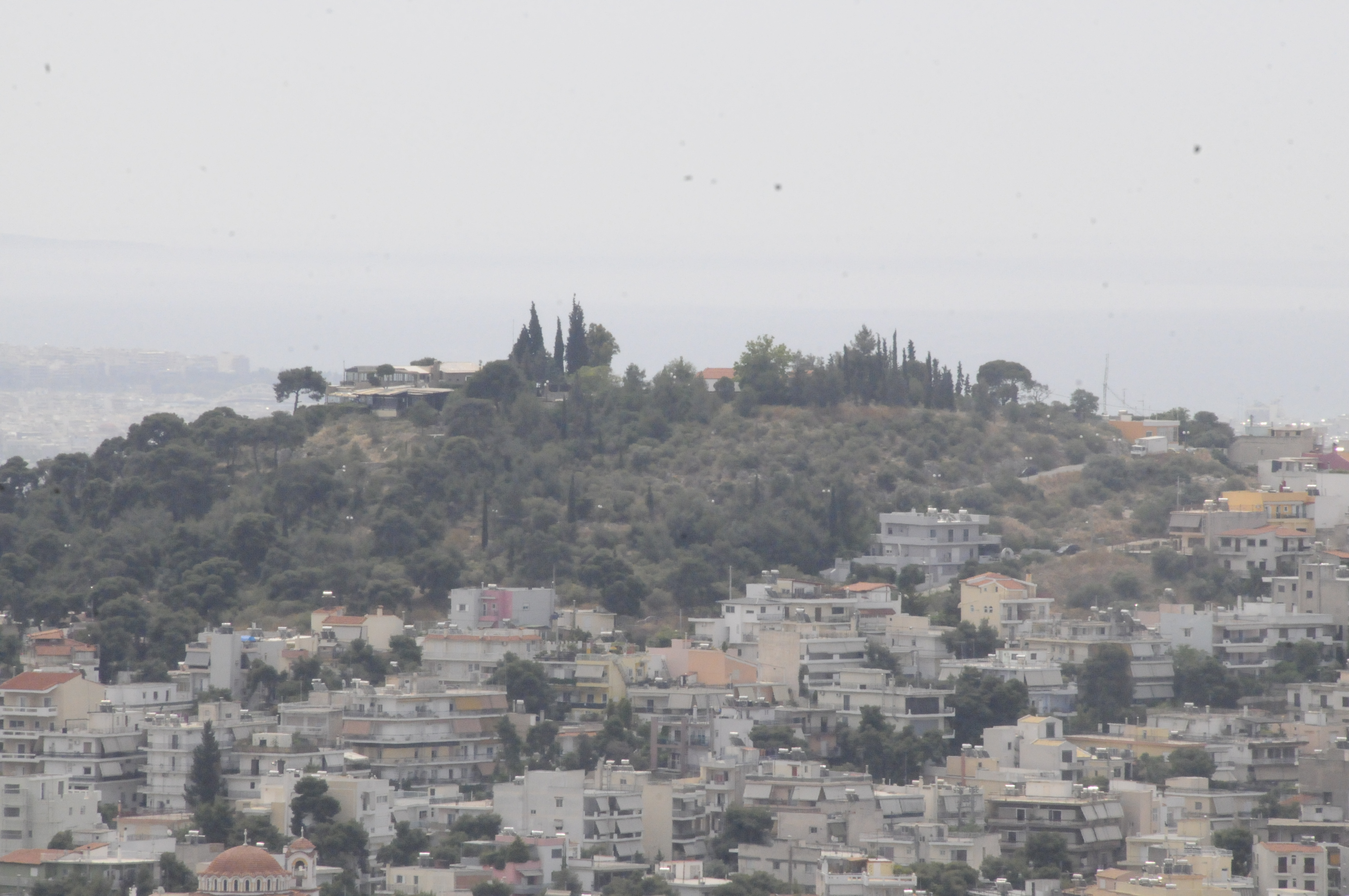 Ο λόφος του Προφήτη Ηλία στο Χαϊδάρι